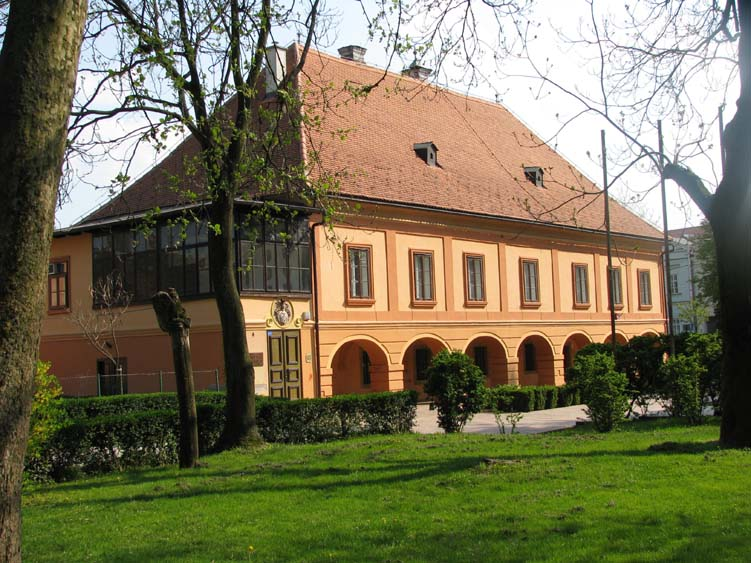 Muzej Turopolja, Velika Gorica